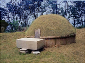 대구 침산동으로 이전했던 박정호, 전주이씨 합장묘, 대구광역시 북구 침산동 산16-28번지 내